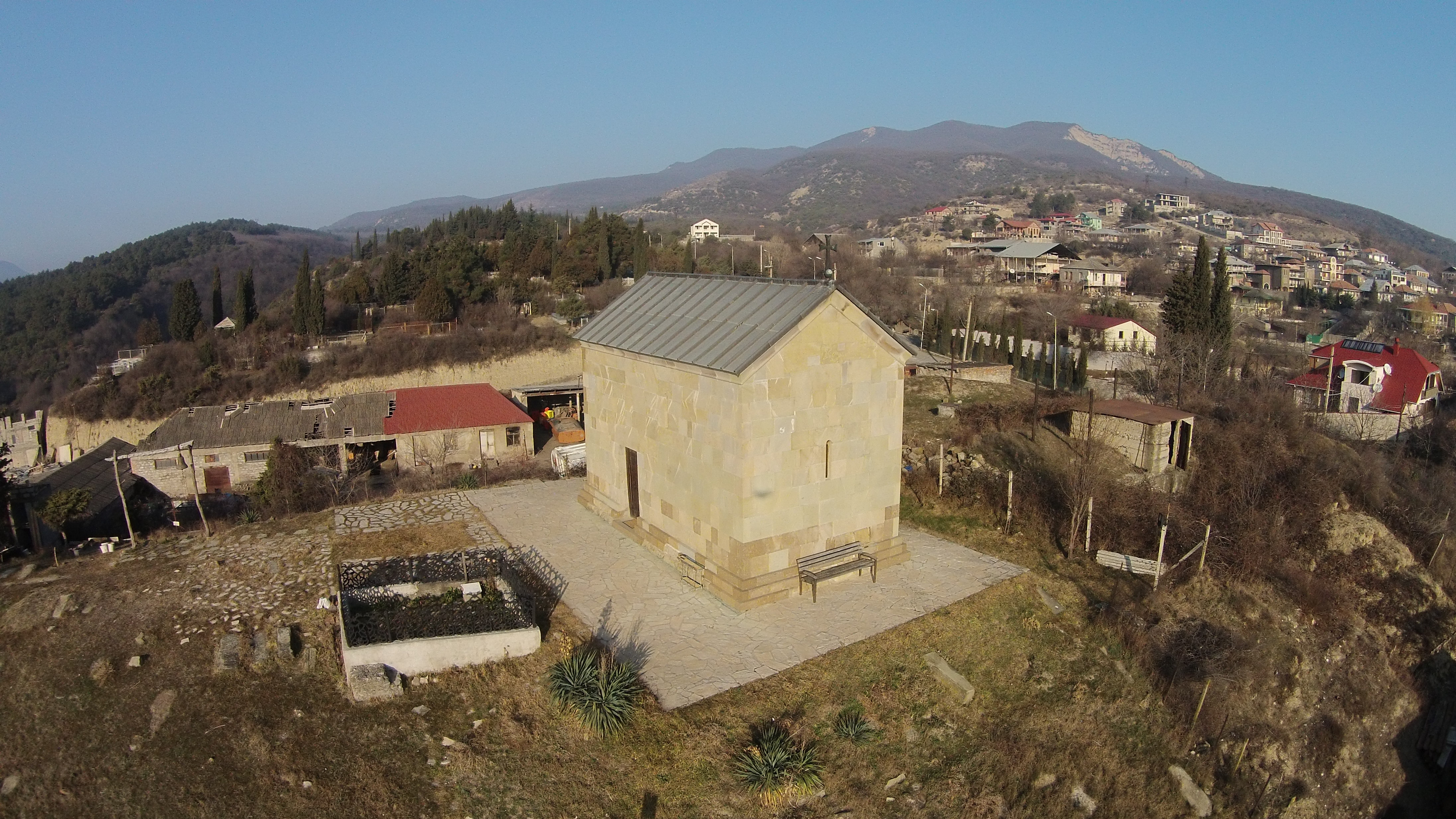 ბარბარეთის ეკლესია, მცხეთა